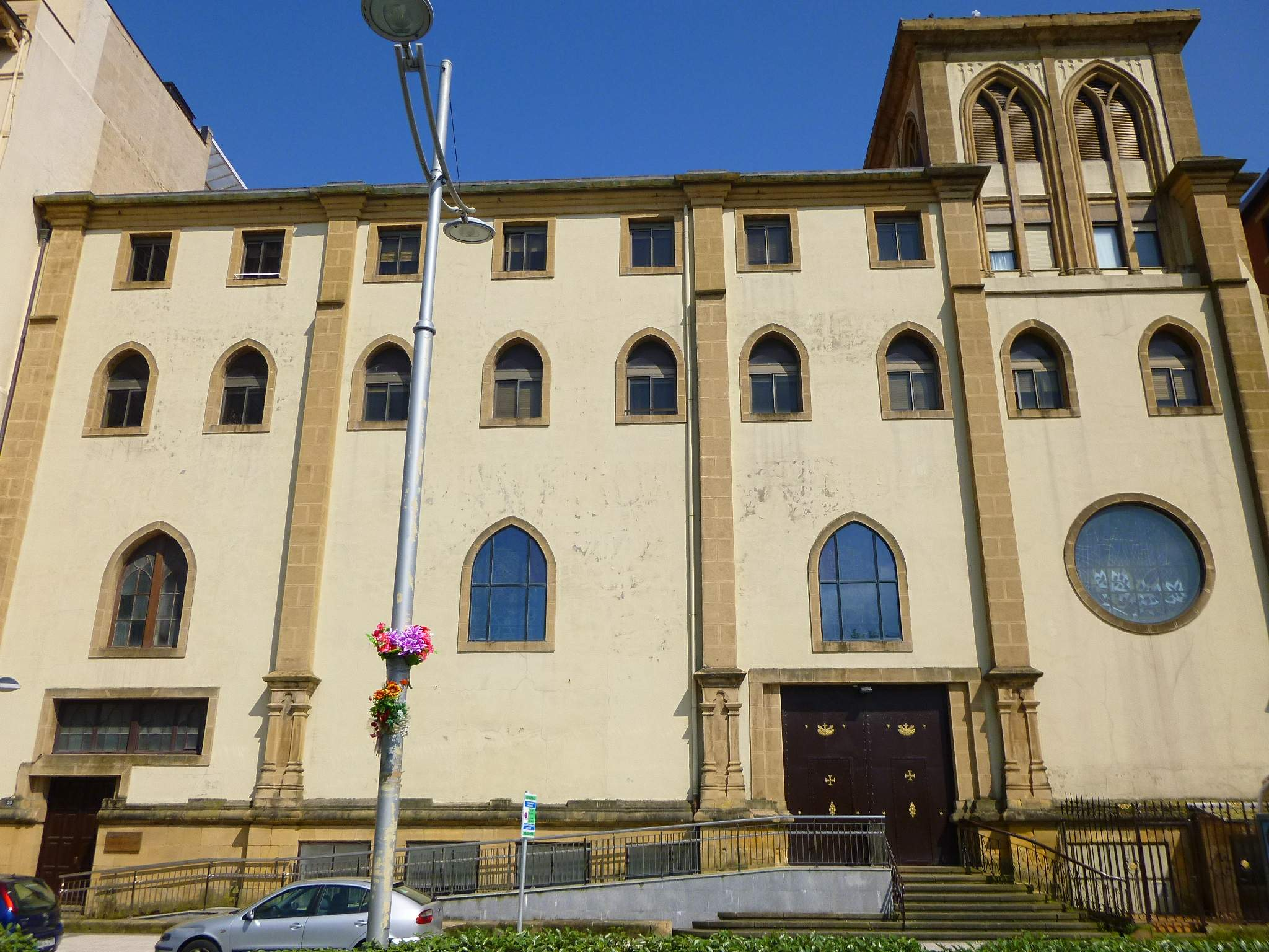 Franciscanos de Atotxa, en Donostia-San Sebastián